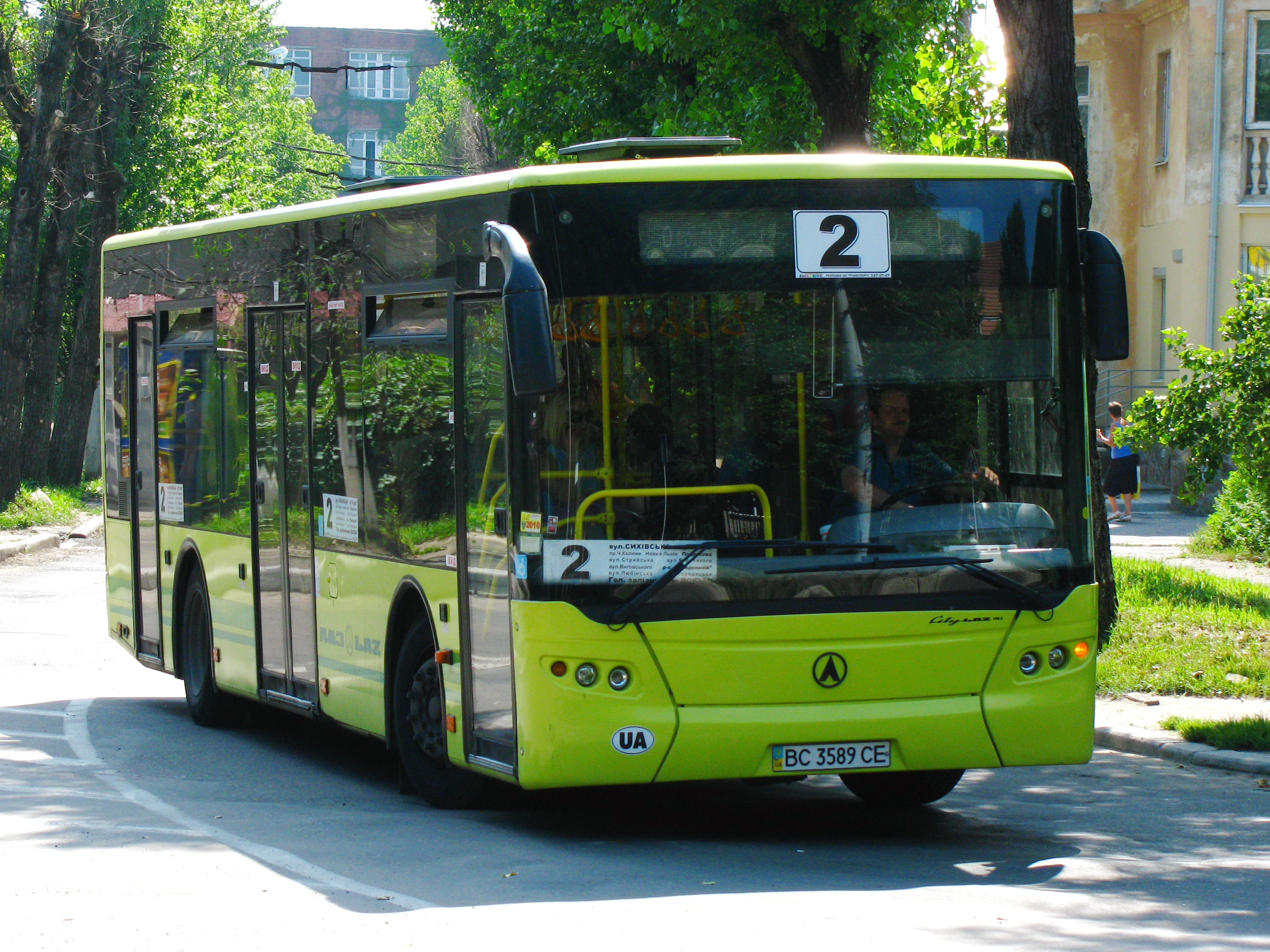 CityLAZ-10LE на автобусному маршруті № 2 на Новому Львові.